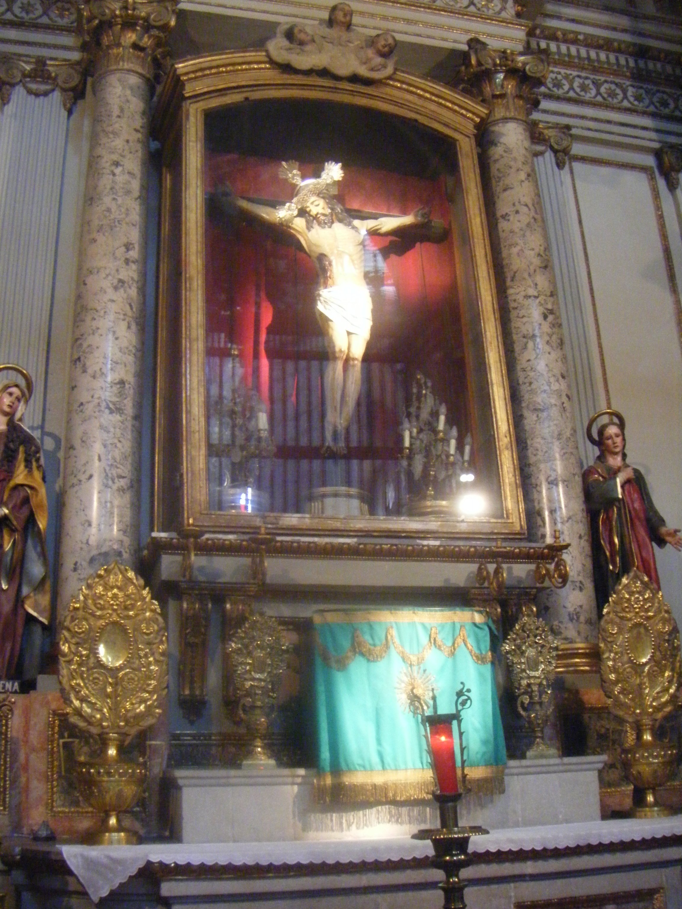 El Señor del Buen Despacho, en la capilla del mismo nombre. Catedral Metropolitana de la Ciudad de México.